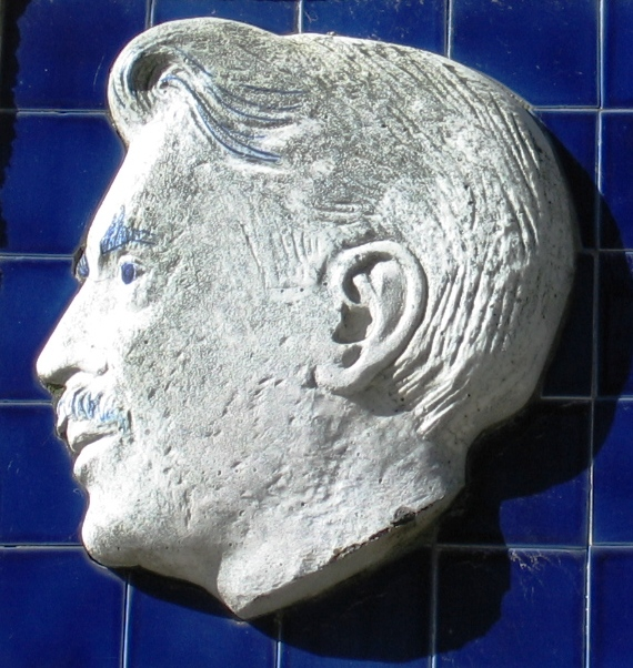 Placa na casa onde viviu Rafael Dieste (Rianxo).